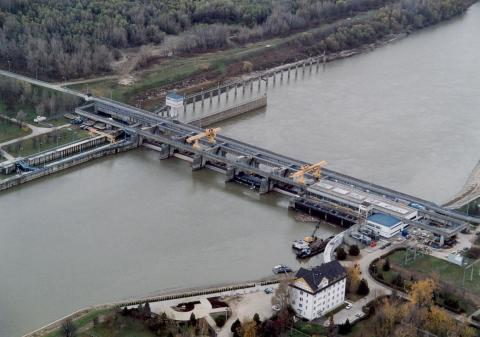 Kisköre, Hungary, aerialphotography